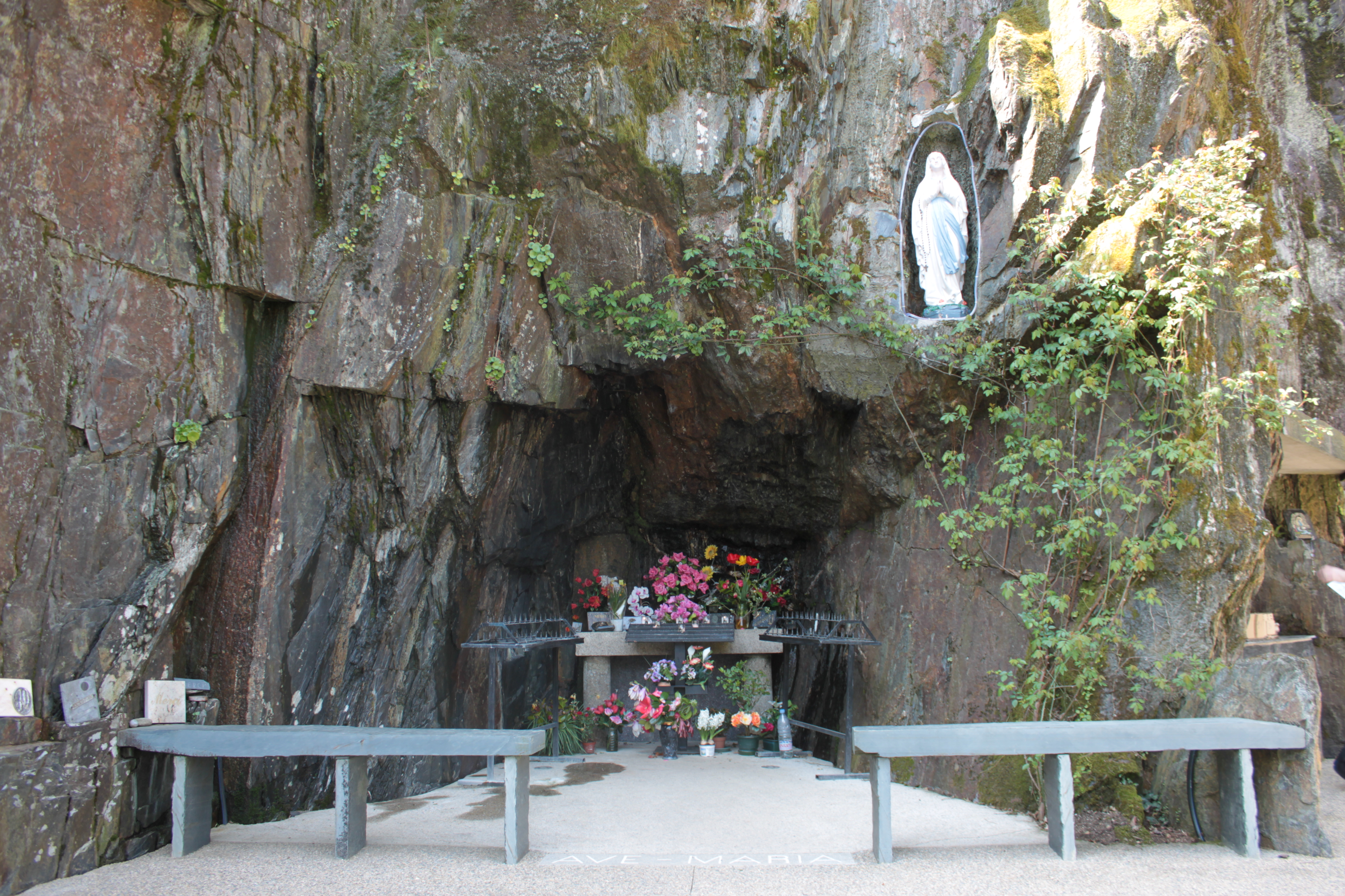 Saint-Joseph, 1948, Callac, Fr-56-Plumelec.